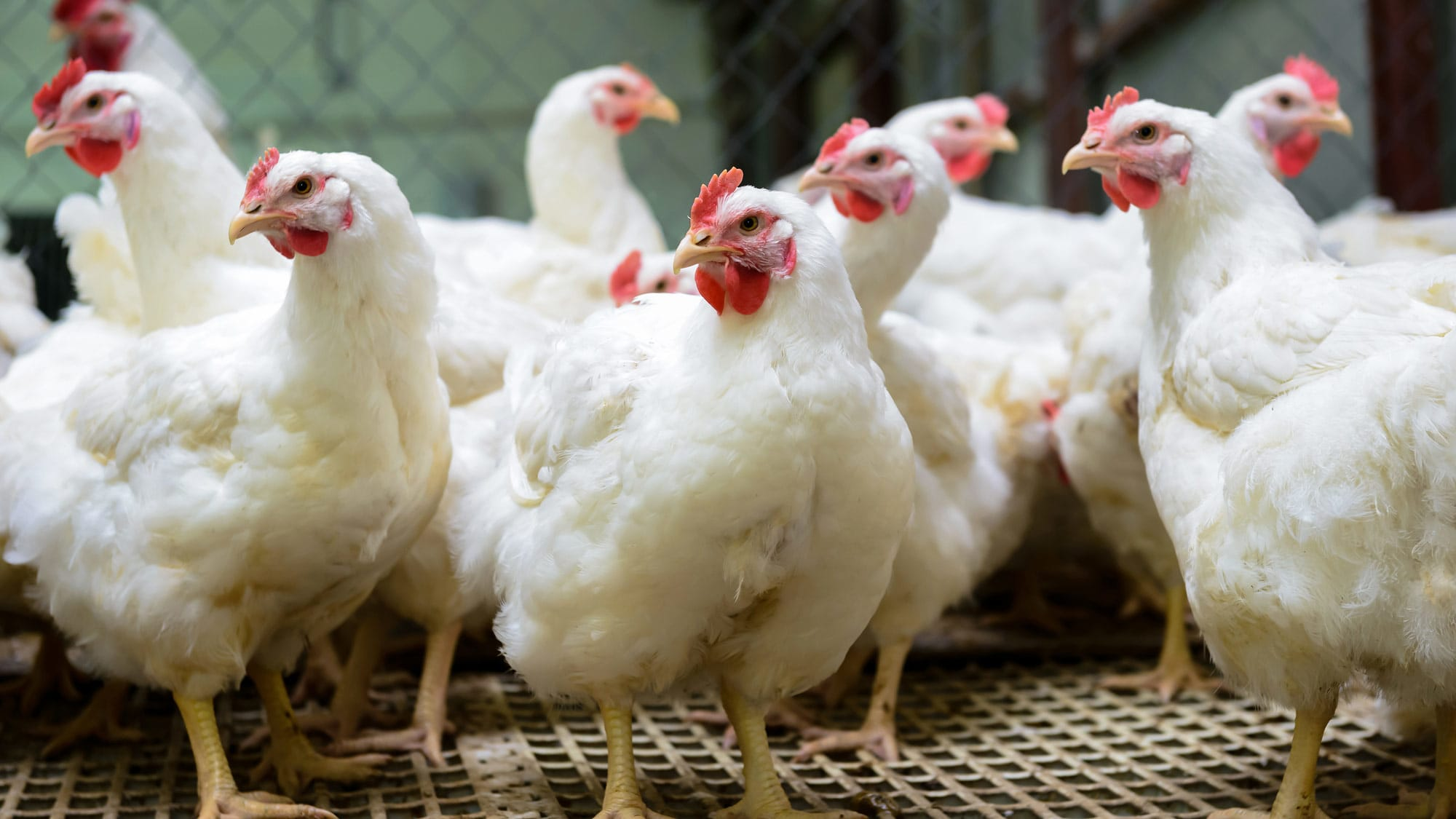 Бройлеры